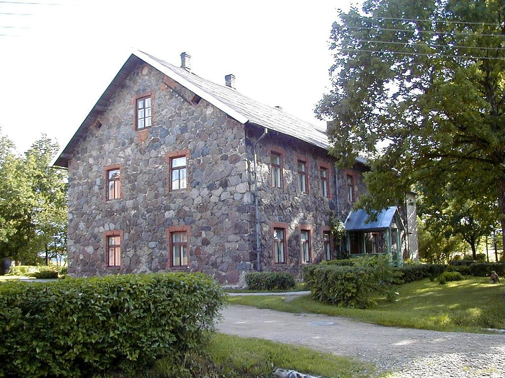 Mežmuižas kungu māja 2002-06-29